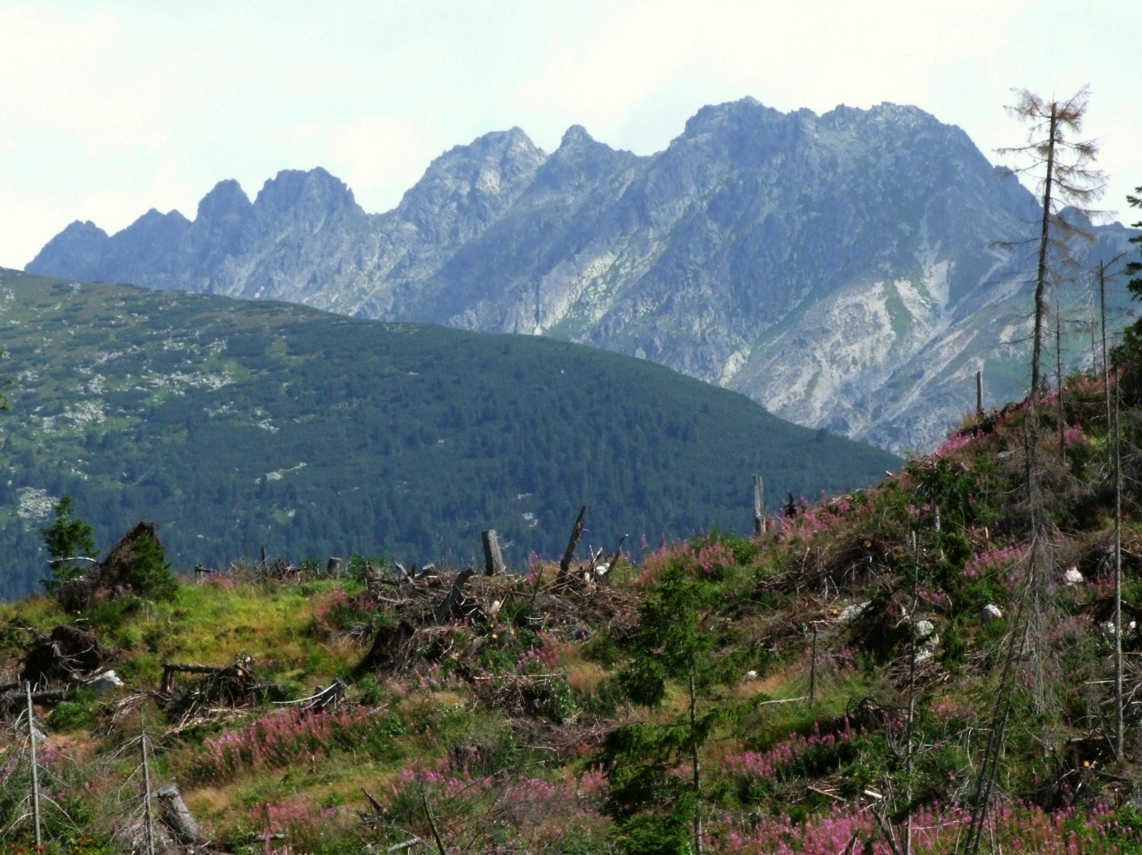 Grań Soliska, widok z południowego zachodu